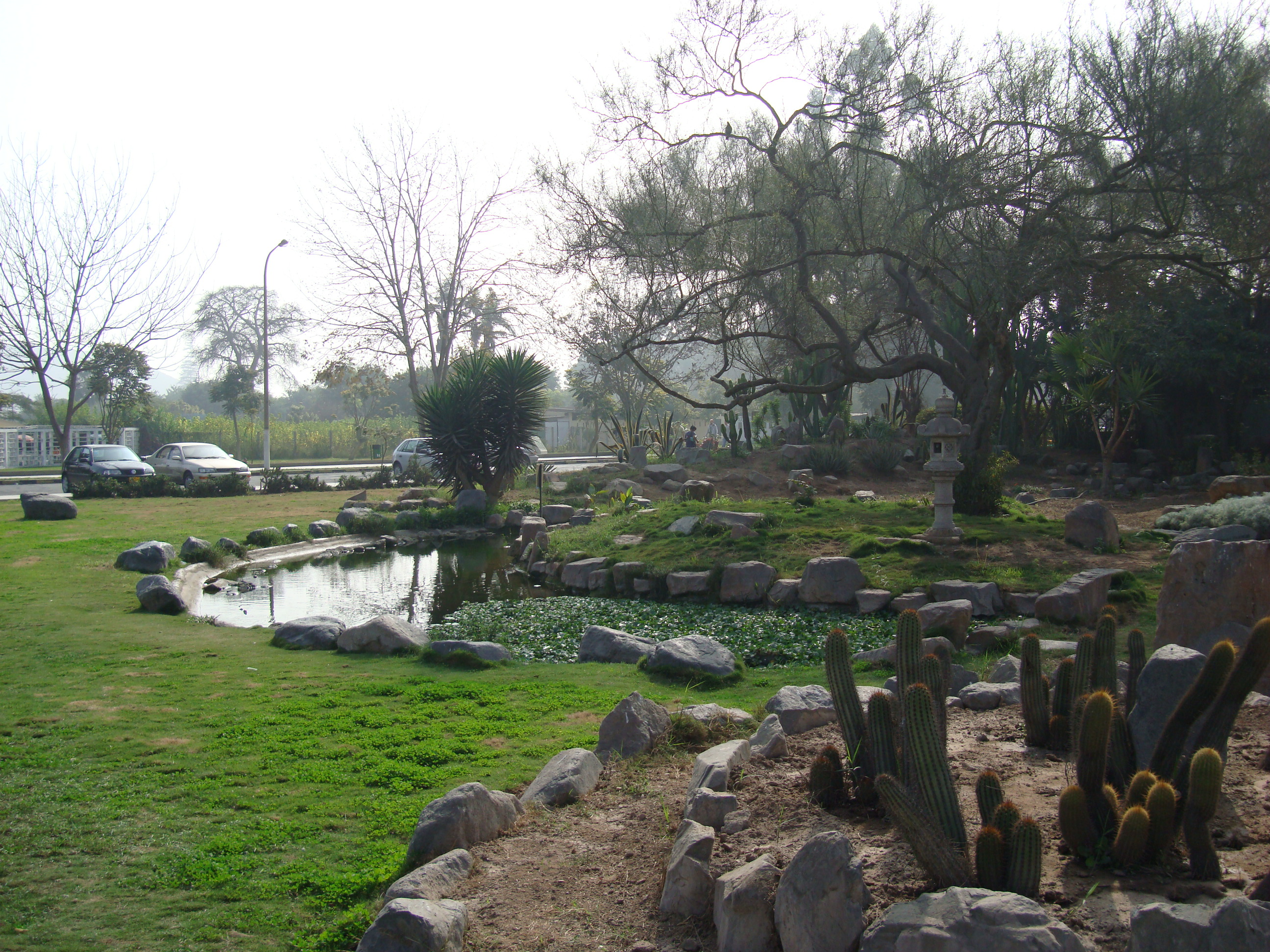 Vista de una Laguna Artificial.